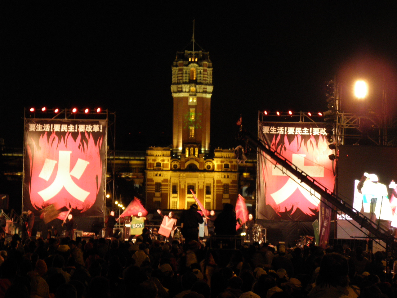 民主進步黨113人民火大一路嗆馬大遊行舞台，設於總統府前方。